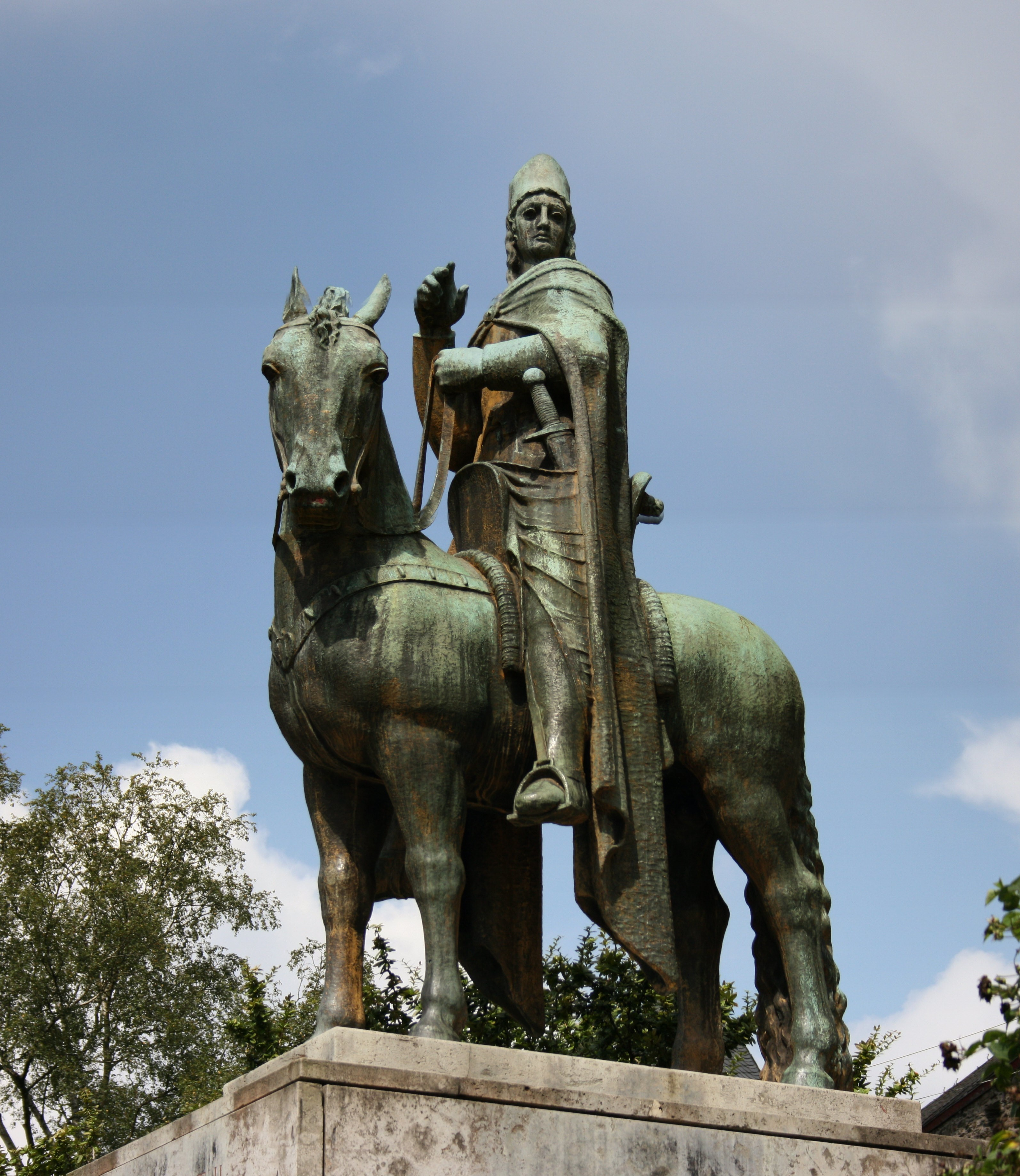 Reiterstandbild Engelbert II von Berg (= Engelbert I von Köln) auf Schloss Burg in Solingen